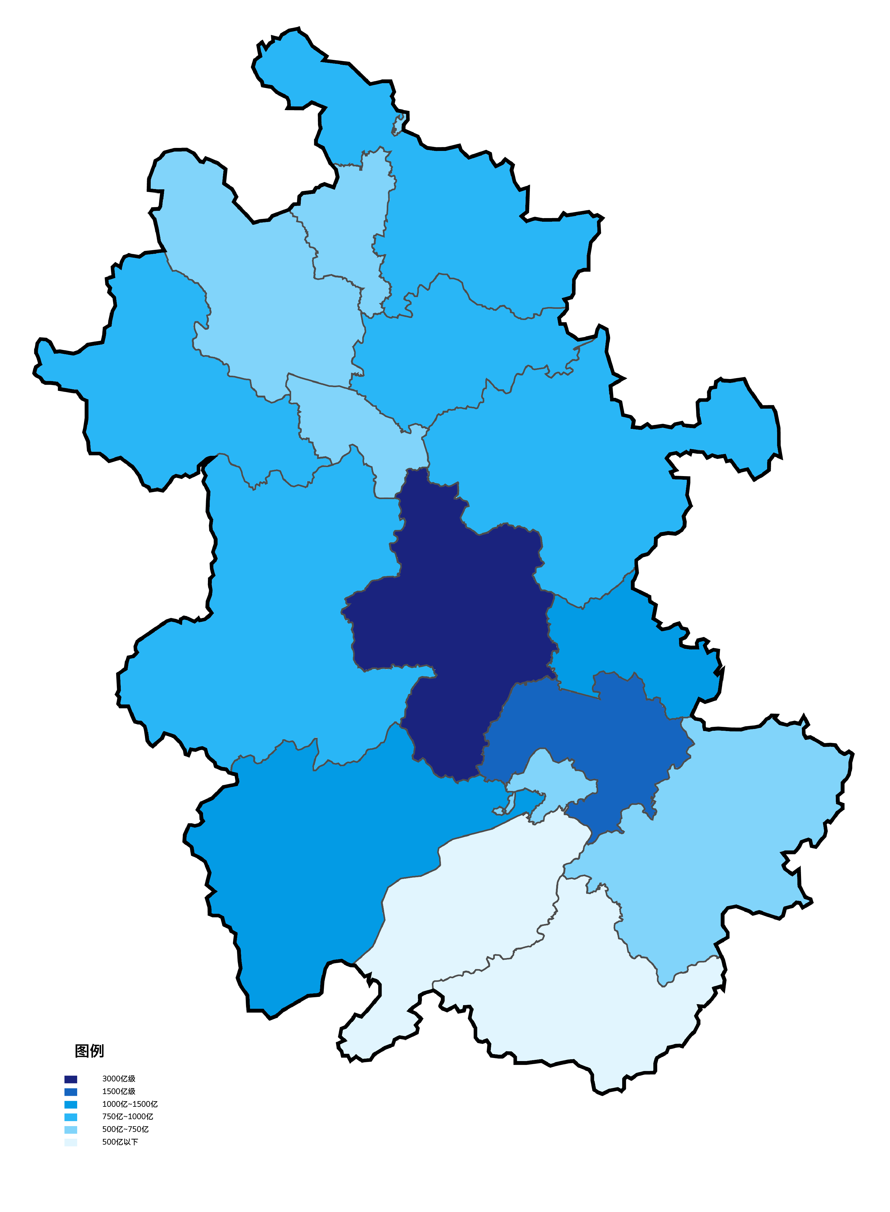 中文（中国大陆）: 安徽省各地级市根据2011年地区生产总值填色地图